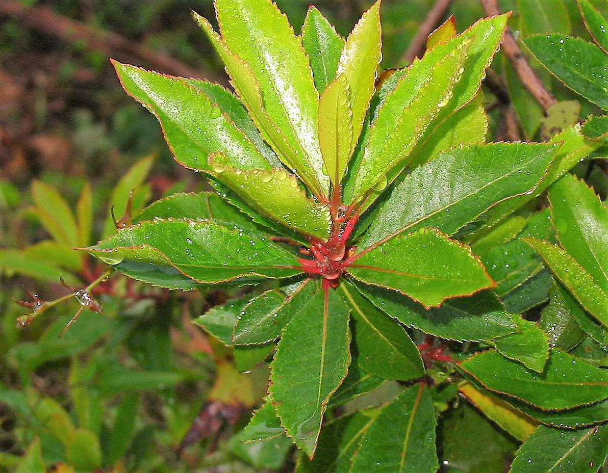 Arbutus unedo. Borrachinal.